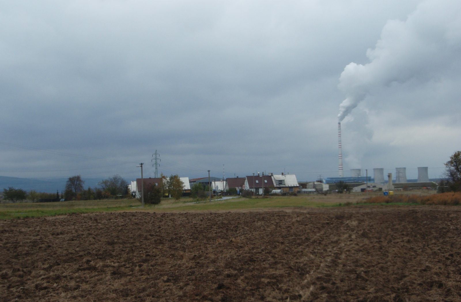 Hradec, část obce Rokle, též Hradec u Kadaně, v pozadí elektrárna Tušimice II